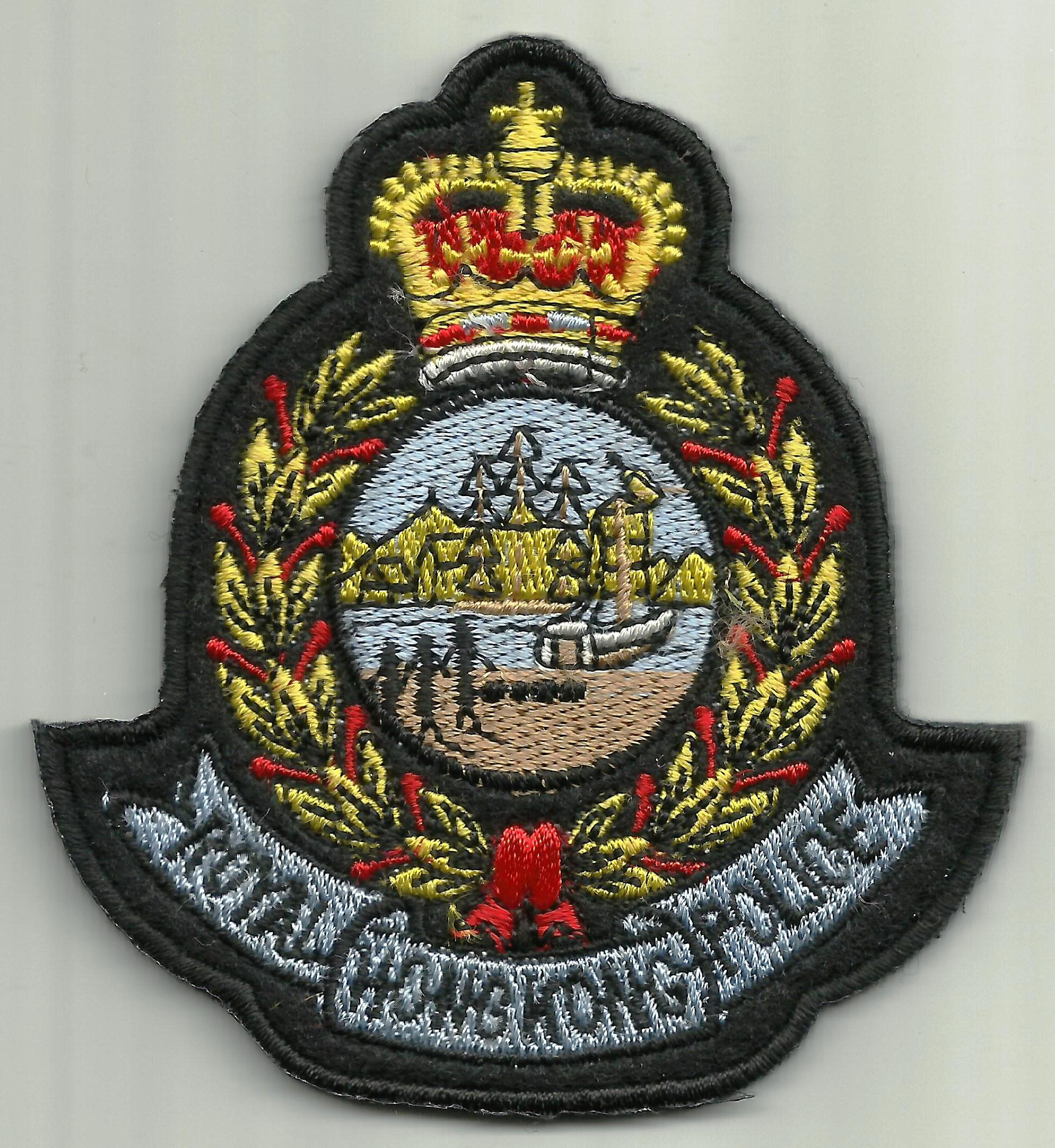 politie embleem uit Hong Kong